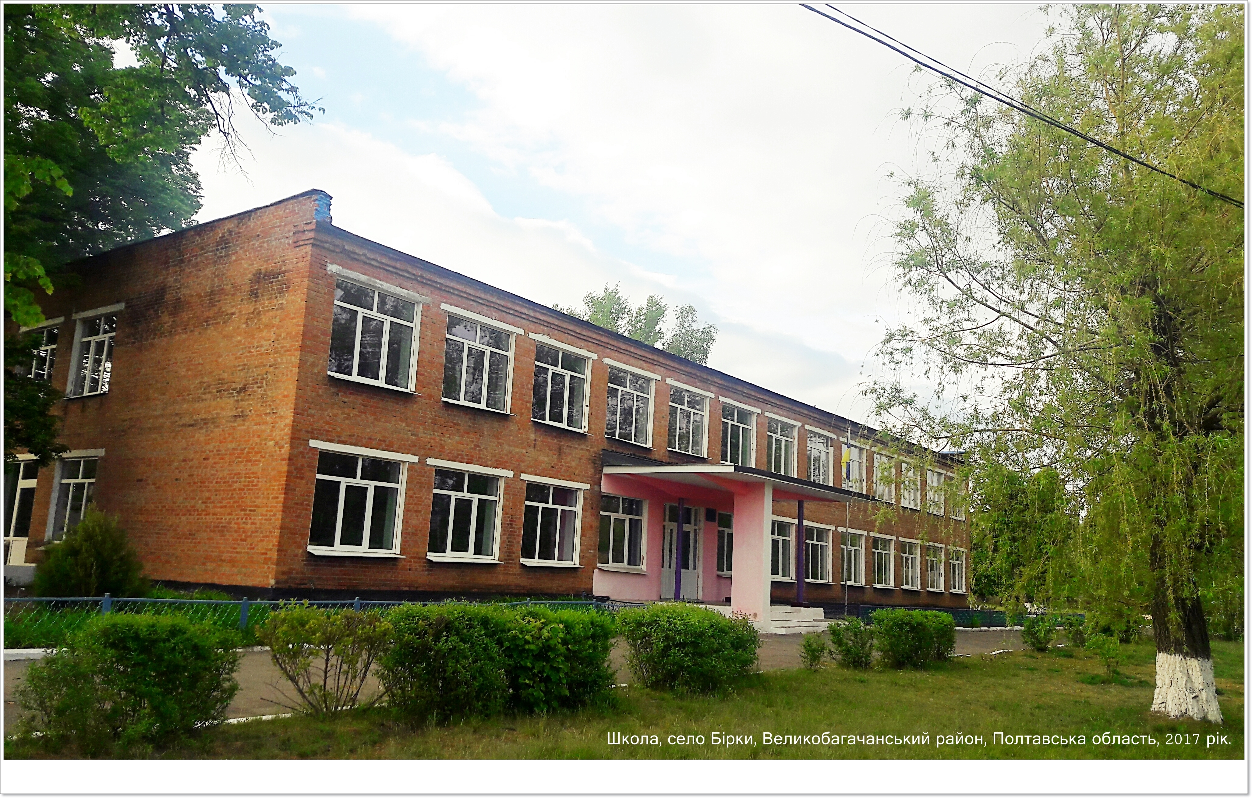 Школа, село Бірки, Великобагачанський район